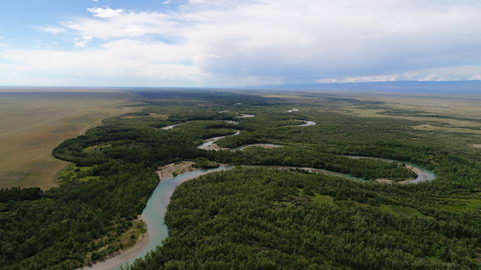 Монгол: Тэсийн гол ОХУ-аас Монгол улс руу орж ирж байгаа хэсэг. Увс аймаг, Тэс сум.